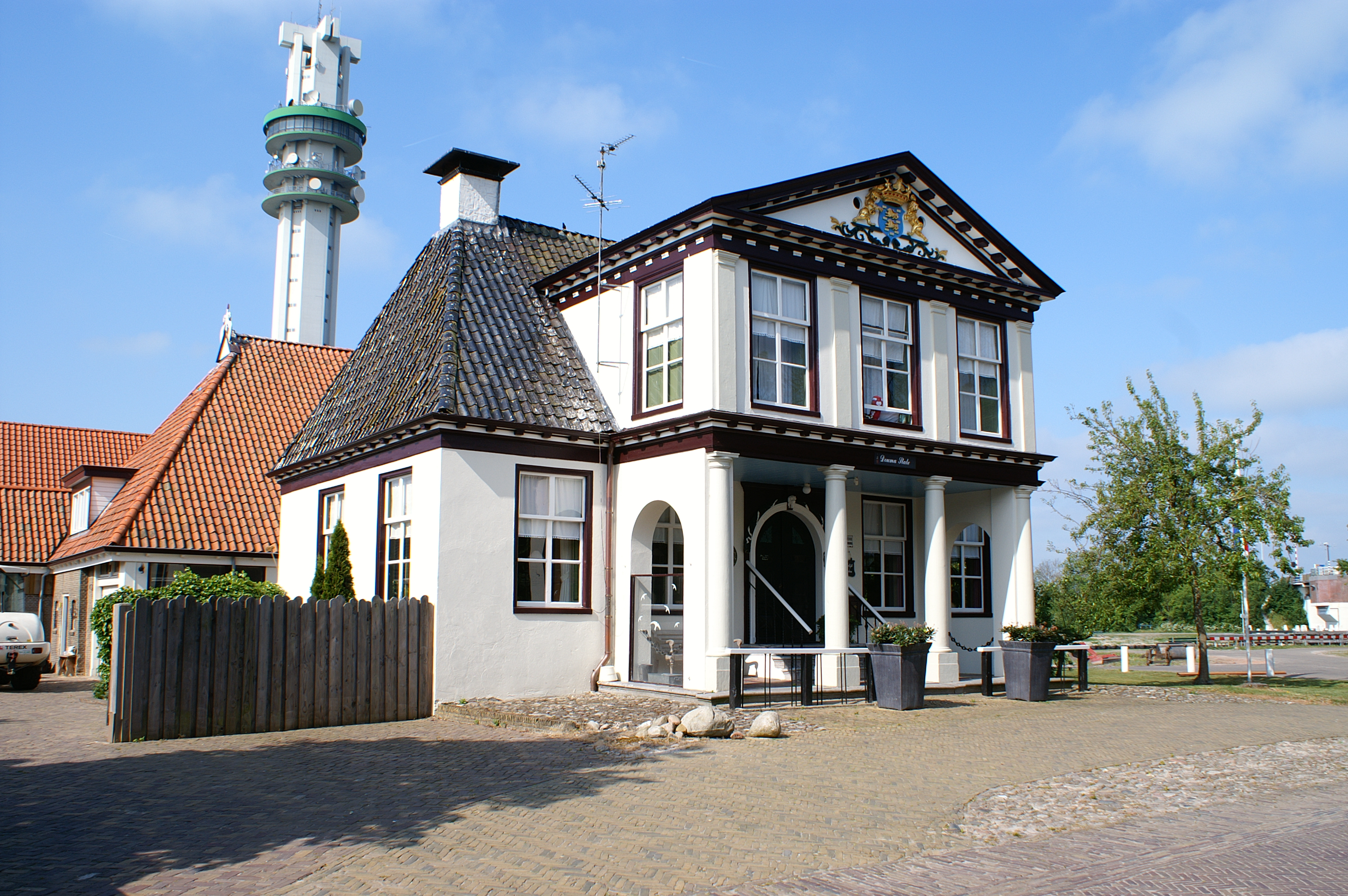 Huize Spannenburg te Tjerkgaast.